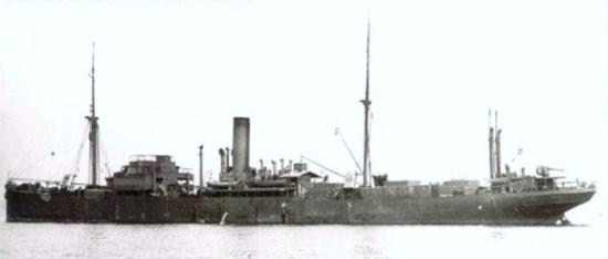 Die Hamburg/Naumburg der DADG als Kentar